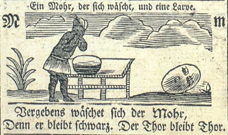 Mohrenwäsche. Holzschnitt ; s/w ; 46 x 79 mm. - In: Bilder-A, B, C, mit einigen Lesübungen, Gedenksprüchen und Gebeten für Kinder. - Stralsund, 1788. Bildunterschrift: "Ein Mohr, der sich wäscht, und eine Larve. Vergebens wäschet sich der Mohr, Denn er bleibt schwarz. Der Thor bleibt Thor."